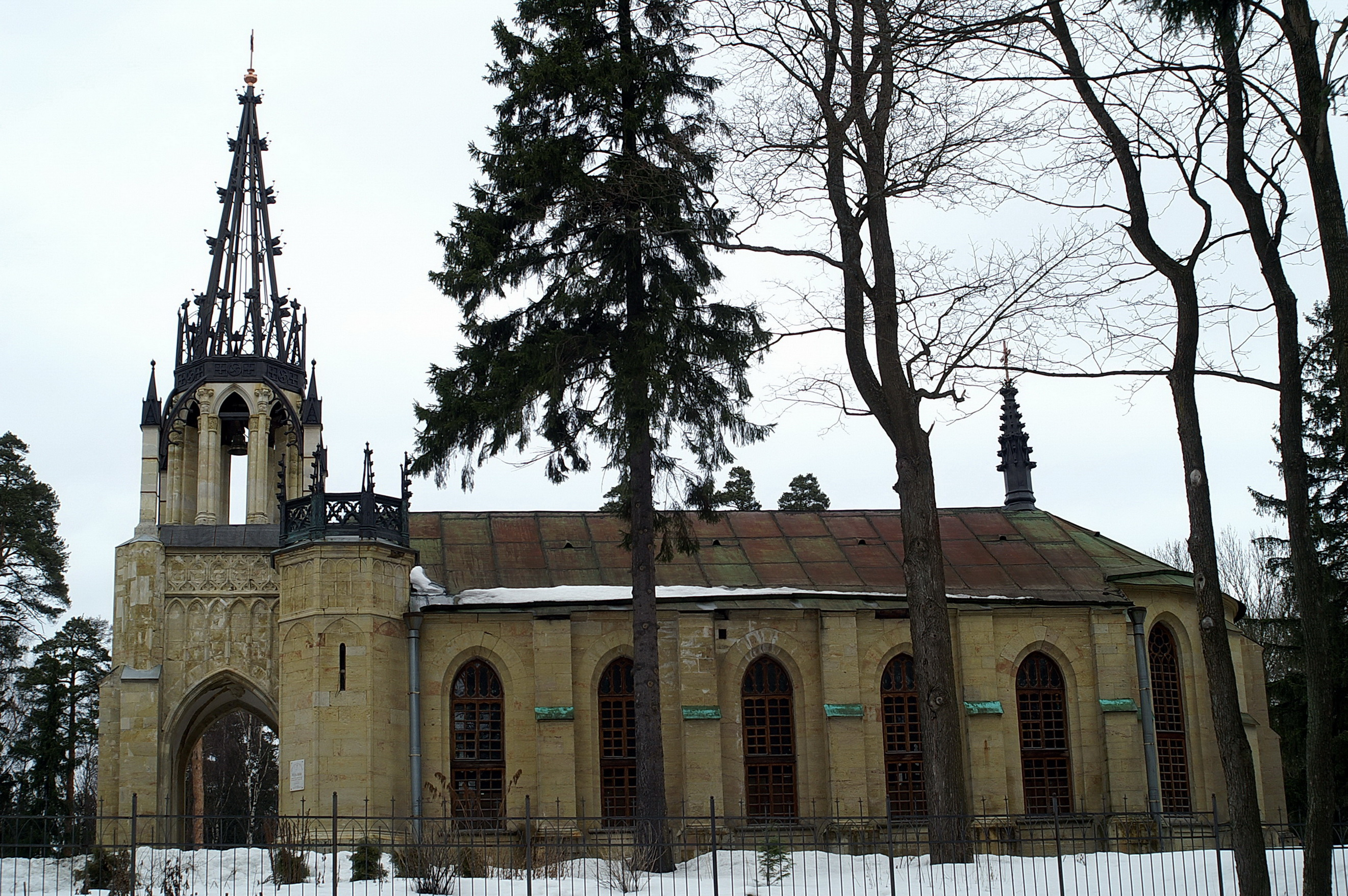 ЦЕРКОВЬ АПОСТОЛОВ ПЕТРА И ПАВЛА, УСАДЬБА ШУВАЛОВЫХ (ВОРОНЦОВОЙ-ДАШКОВОЙ Е.А.) "ПАРГОЛОВО", С-ПЕТЕРБУРГ